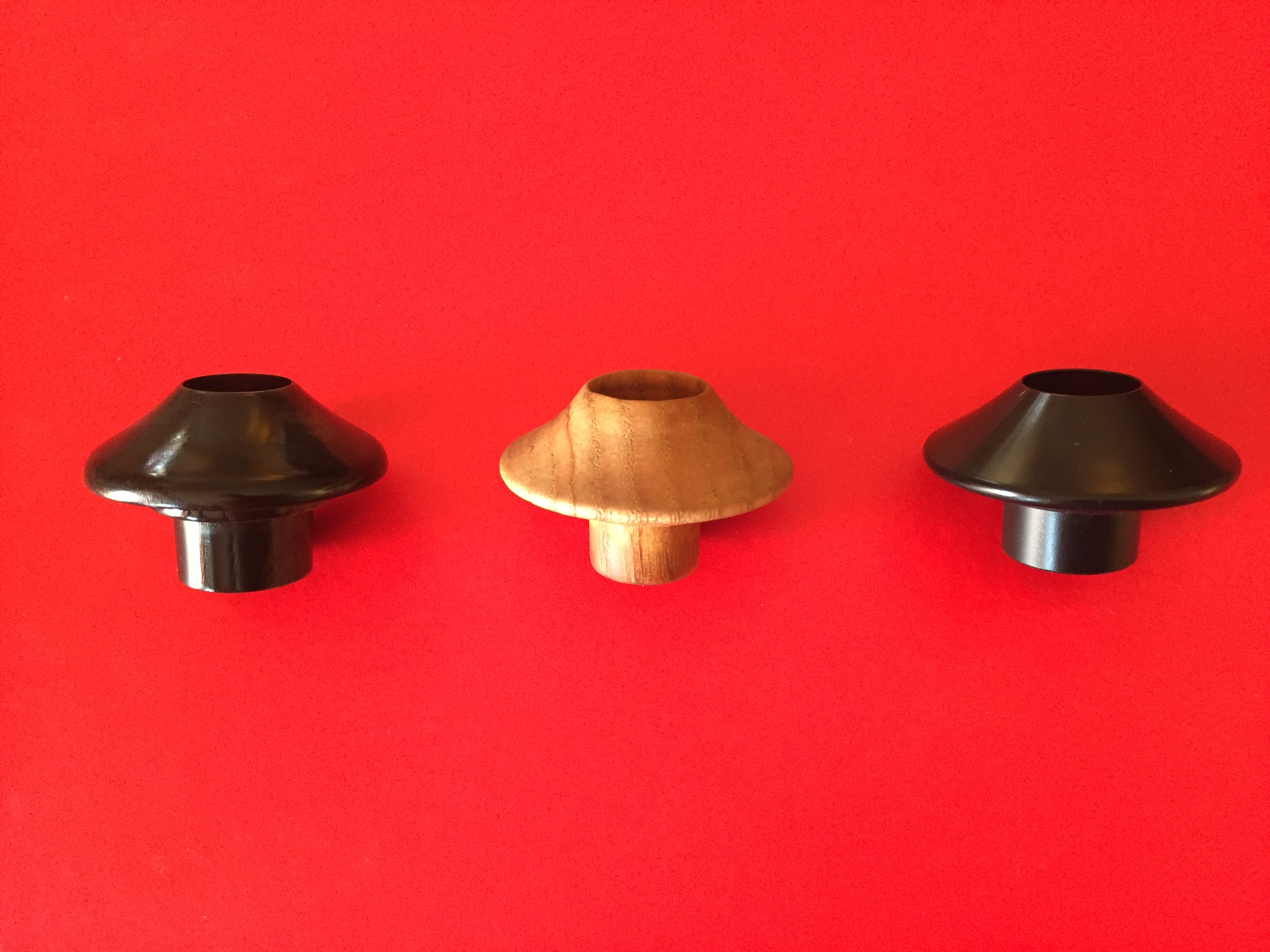 Tre başpare turchi: in osso di bufalo, in legno e in materiale plastico